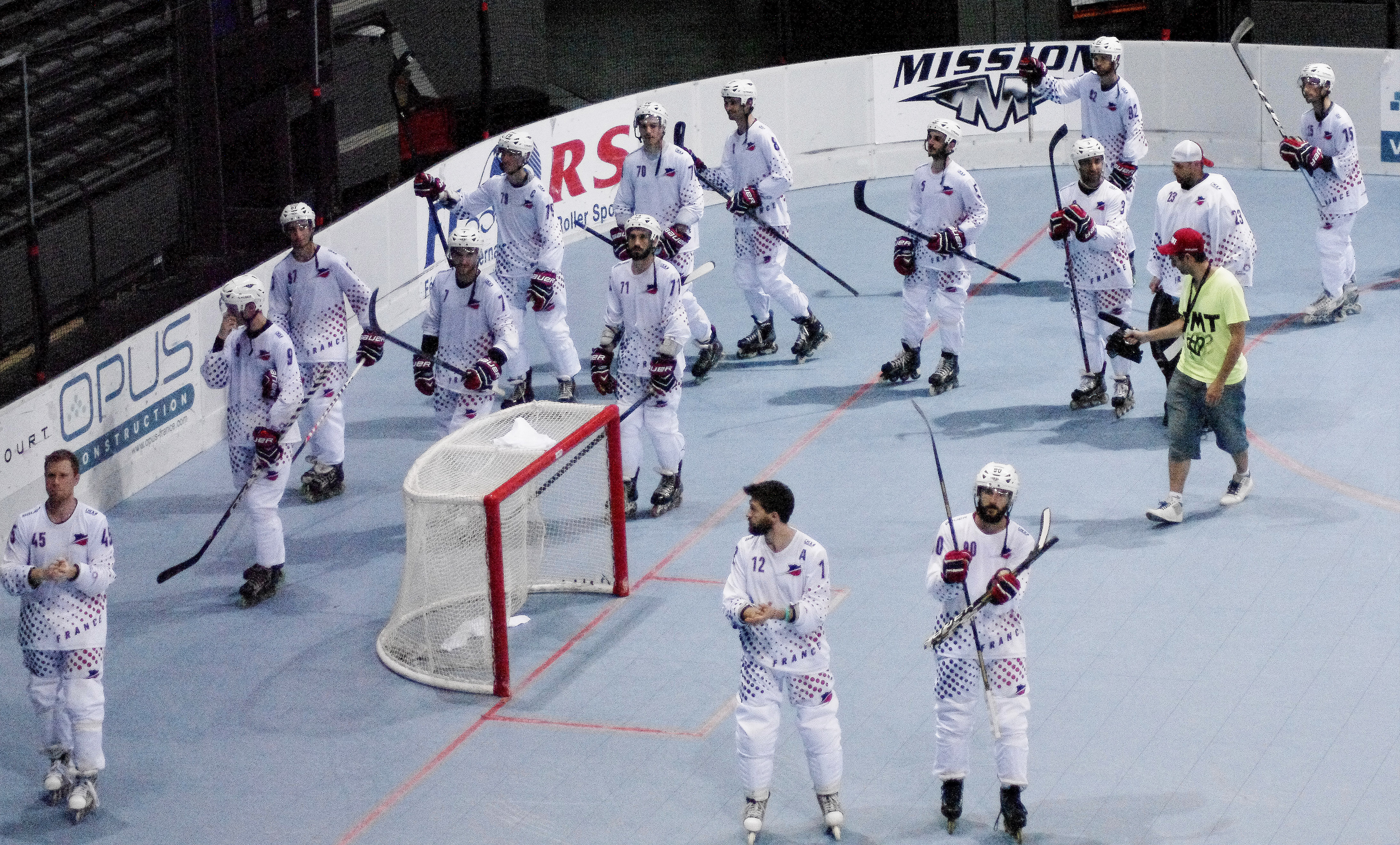 Tour d'honneur de l'Équipe de France aux championnats du monde 2014 de roller in line hockey